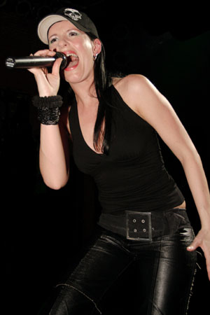 Jacob Reiding is de eigenaar van de Auteursrechten van de foto welke gemaakt is op 28 april 2006 waarop de zangeres van Autum afgebeeld is (nummer 20190). Jacob Reiding geeft hierbij toestemming om deze foto zonder tegenprestatie te gebruiken bij een artikel gerelateerd aan Autumn op Wikipedia. Naamsvermelding wordt zeer gewaardeerd.